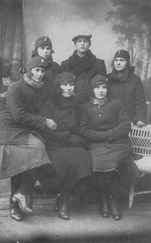 Беларуская (тарашкевіца): Гімназысты пружанскай гімназіі імя Адама Міцкевіча